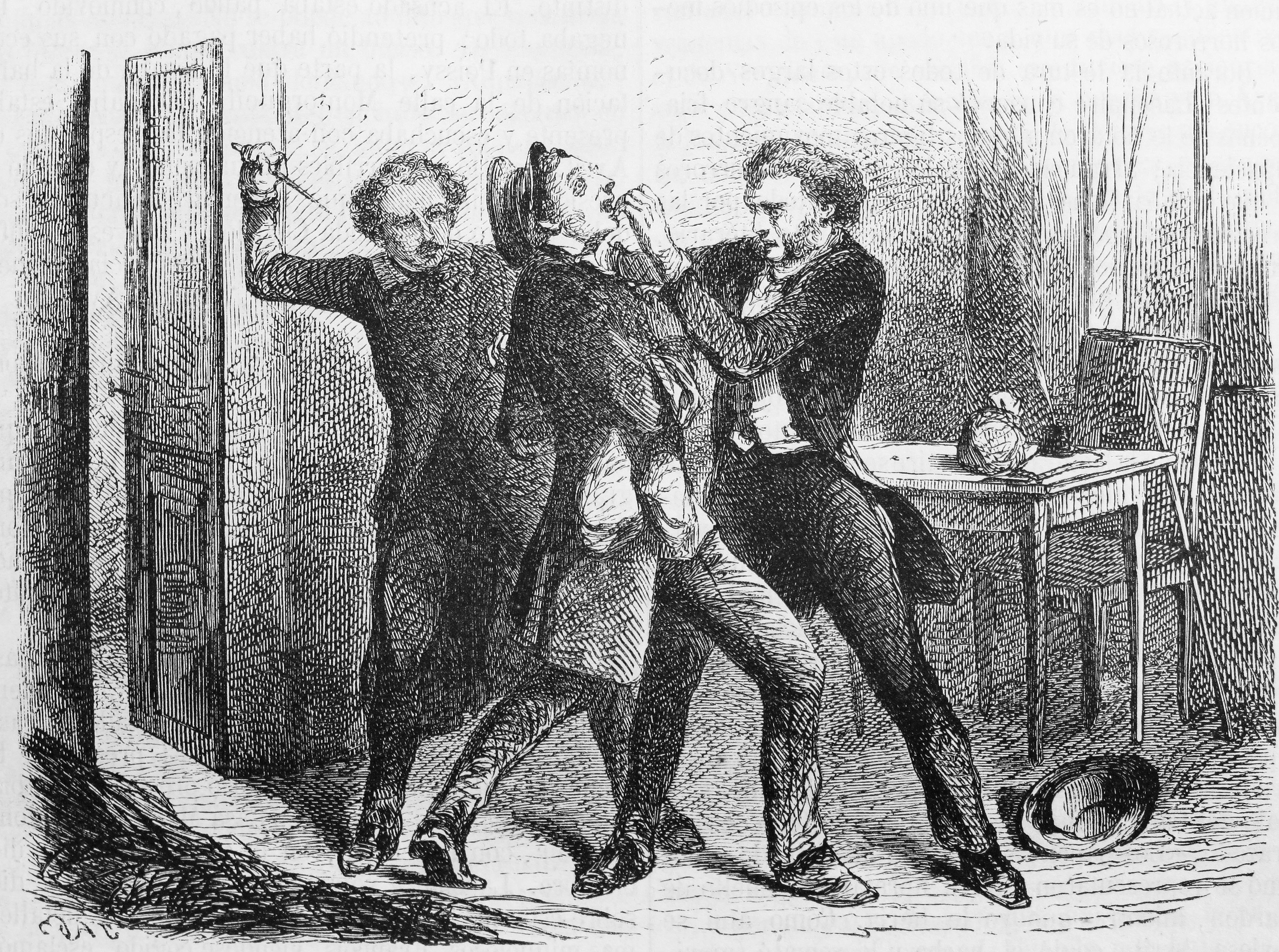 Robos y asesinatos por Lacenaire, Francois y Avril. "Tentativa de asesinato contra Genevay." Ilustraciones de la obra : Anales dramáticos del crimen ó Causas célebres españolas y estranjeras [sic] / estractadas [sic] de los originales y traducidas, bajo la dirección de José de Vicente y Caravantes. - Madrid : Imprenta de Fernando Gaspar [etc.], 1858-1866. - Ed. il. con grabados...